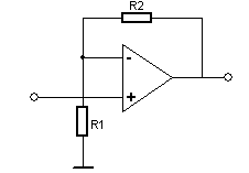 Niet-inverterende versterkerschakeling met opamp.